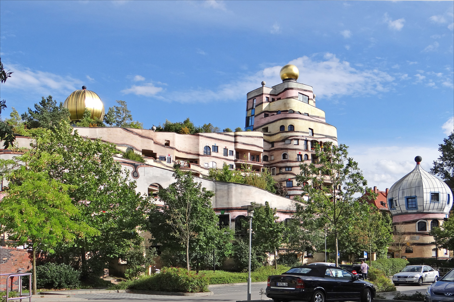 Vue d'ensemble de l'immeuble d'habitation appelé Waldspirale conçu par l'architecte et artiste autrichien Hundertwasser, l'immeuble a été terminé en 2000 Article de Wikipedia sur l'immeuble Waldspirale Article sur Hundertwasser